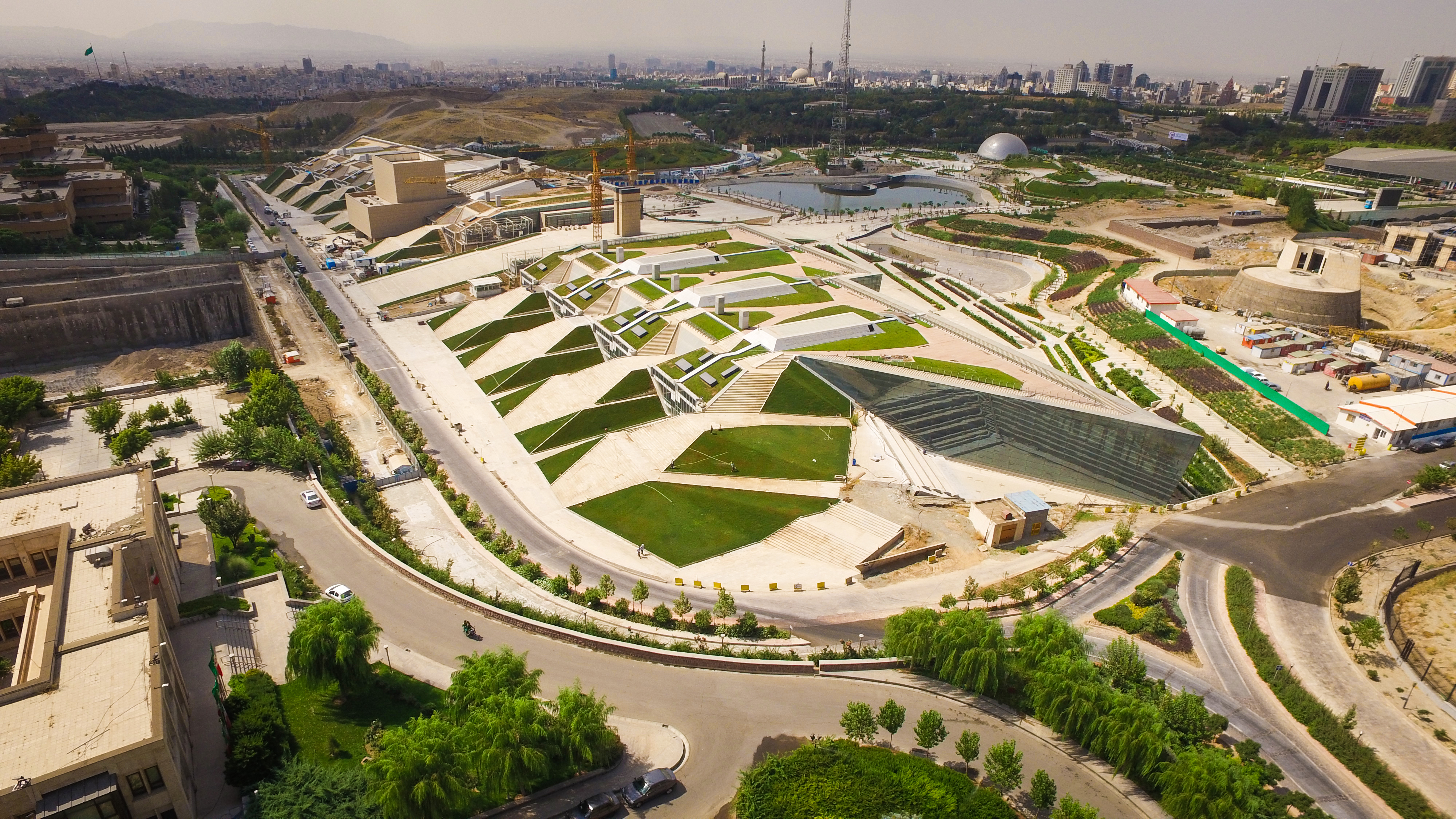 نماي كلي باغ كتاب تهران-1396